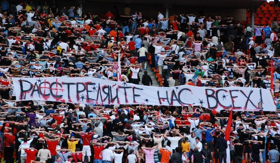 Баннер "Расстреляйте нас всех!" на матче с раменским "Сатурном". 2009 год